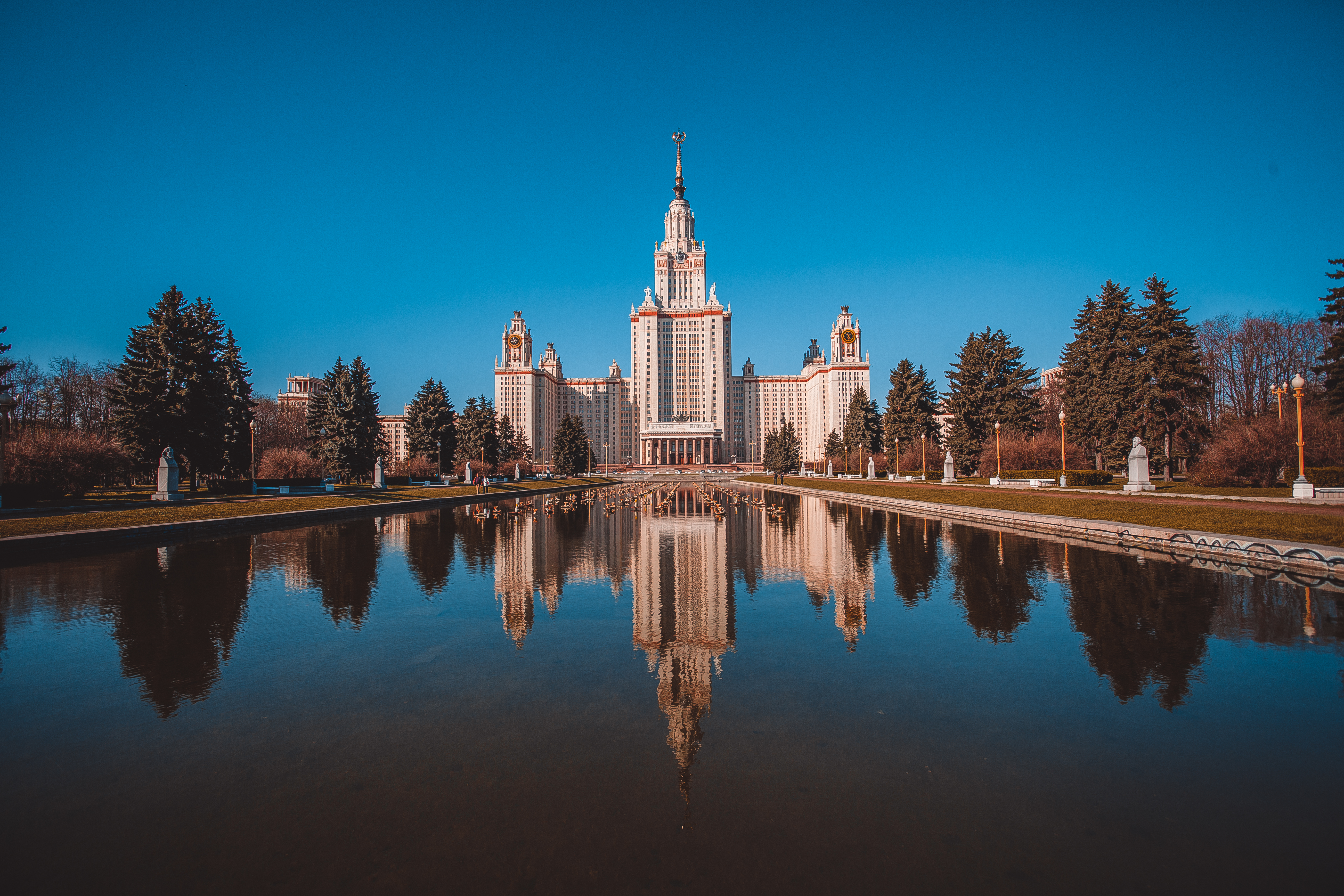 Московский государственный университет им. Ломоносова (Москва и Московская область, Москва, Моховая улица, 9, 11)